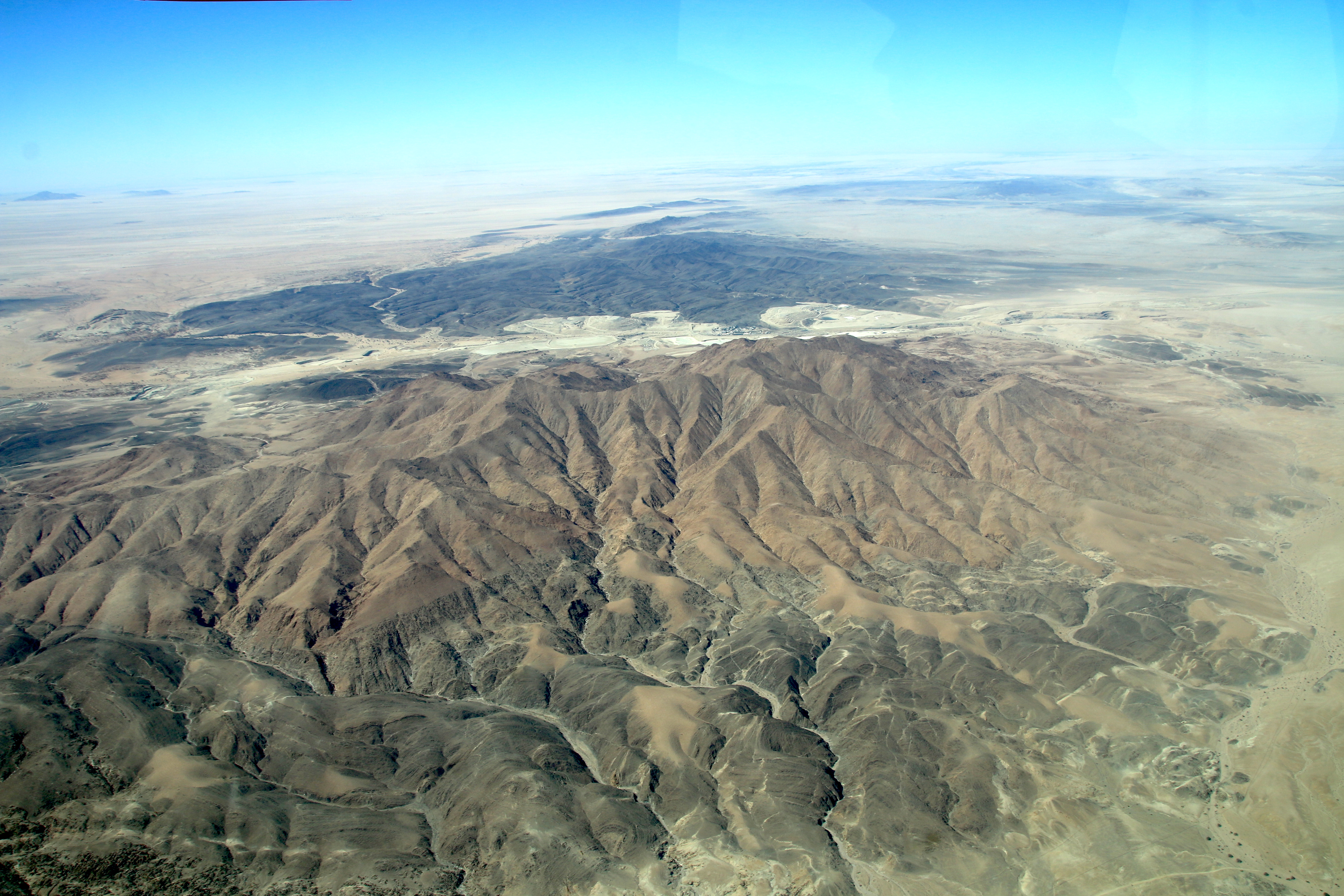 Langer Heinrich und Uranmine aus 2000m Hoehe (2018)